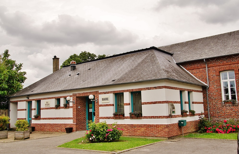 La Mairie